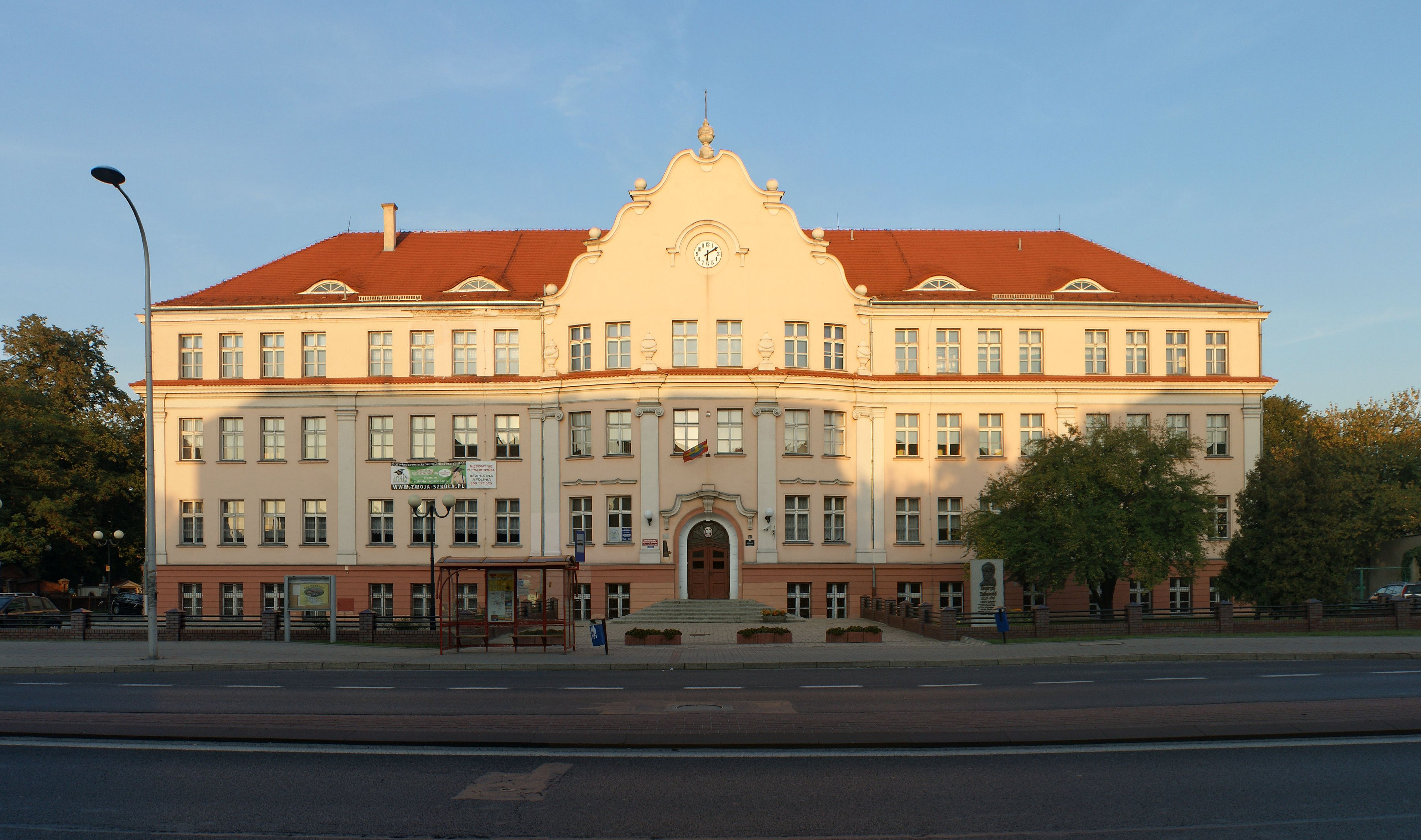 Ostrów Wielkopolski, ul. Wrocławska 51 - dawna Wyższa Szkoła dla Dziewcząt (1924-1926), obecnie szkoła podstawowa nr 2 Ewarysta Estkowskiego (zabytek nr 729/A)